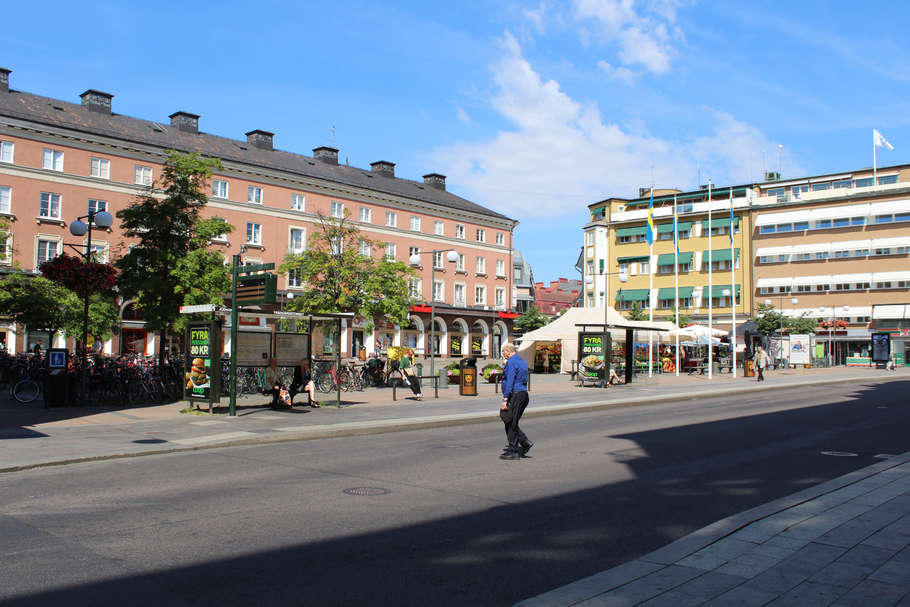 Trädgårdstorget, Linköping